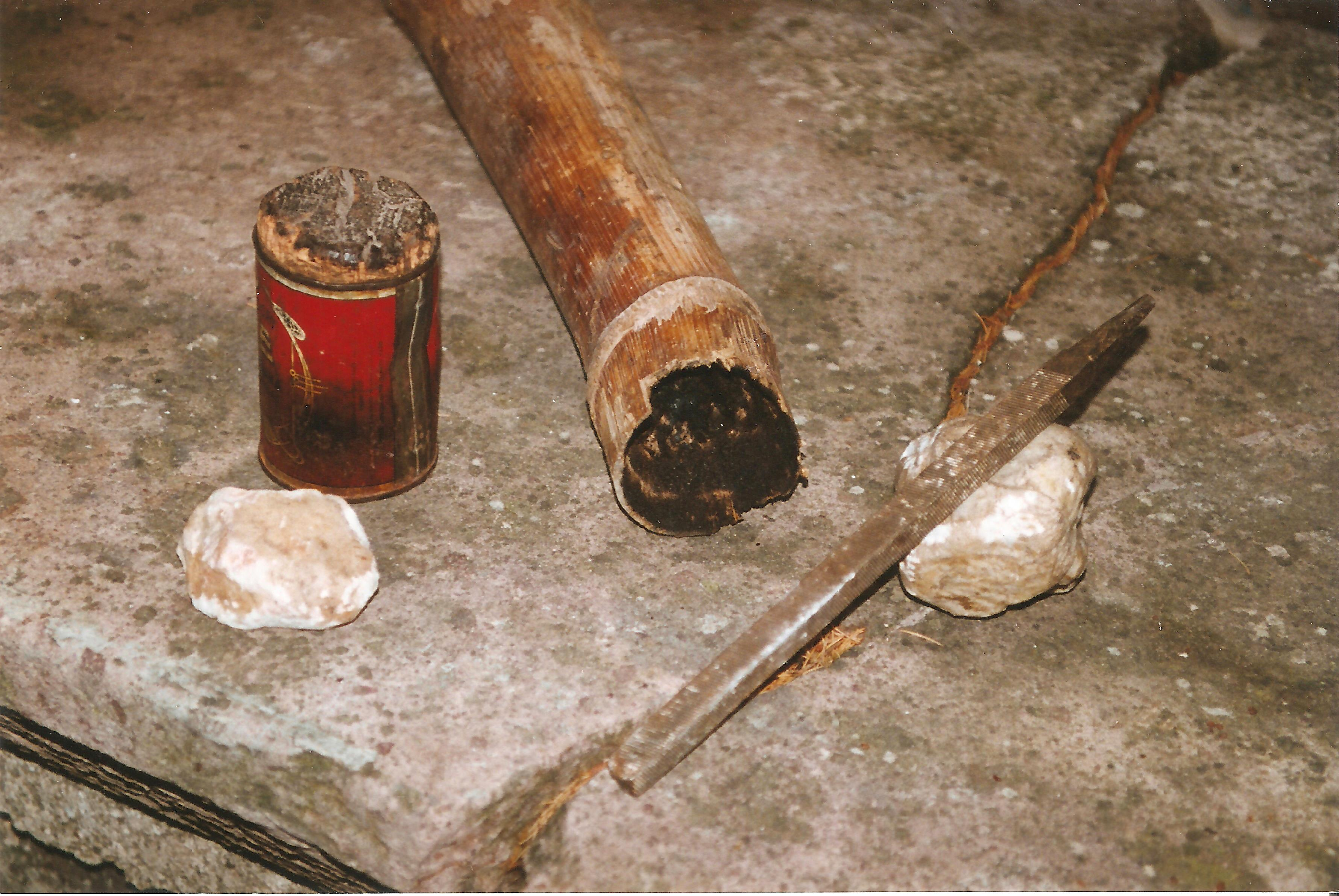 Bortigali - Settimana santa - Attrezzatura per la praparazione di "su fogu virgine"